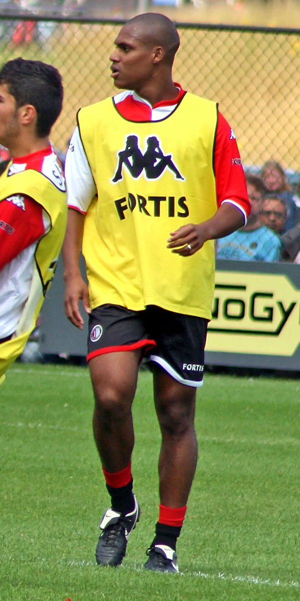 André Bahia (Feyenoord)